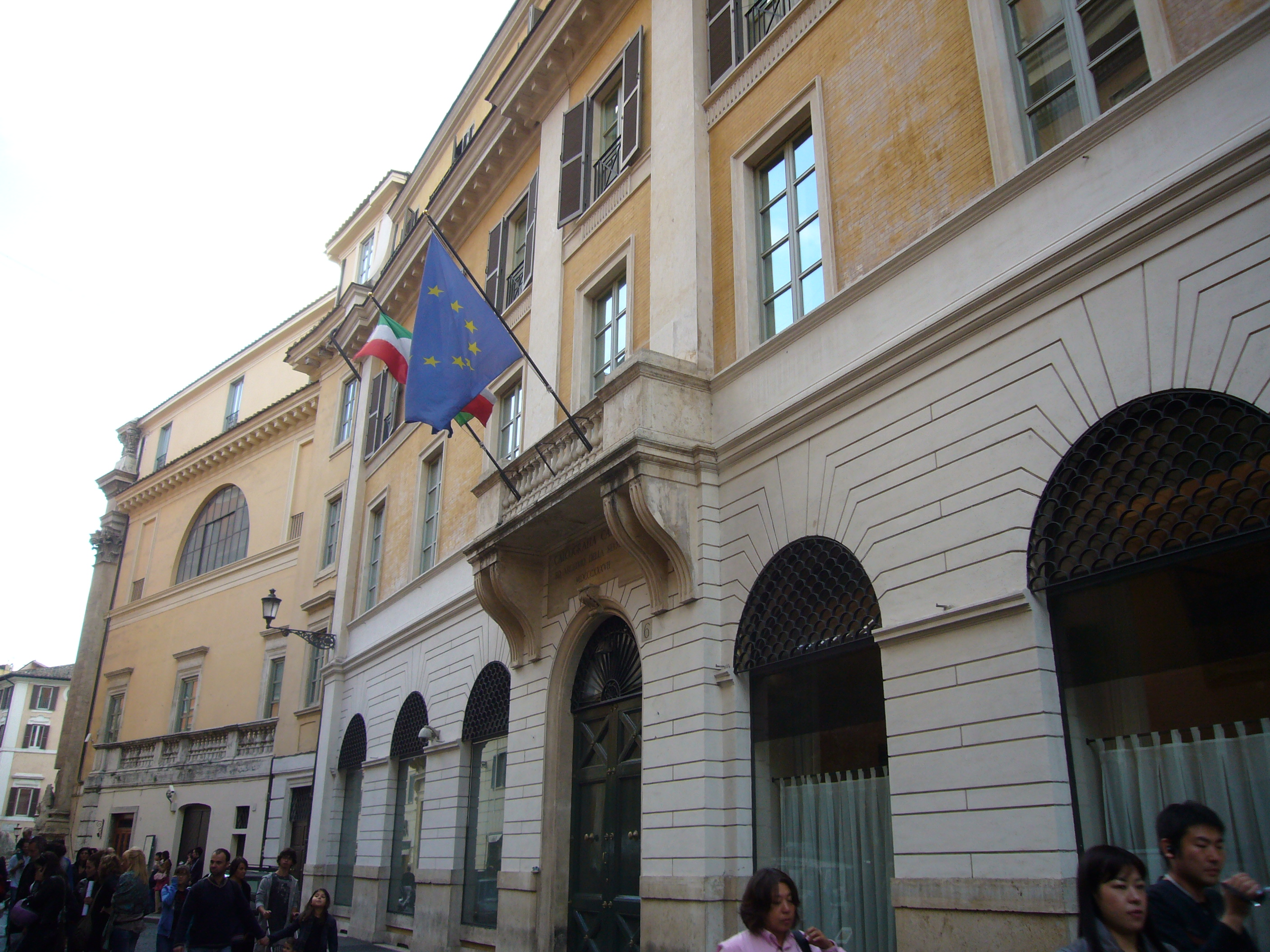 Roma, palazzo Poli, oggi Calcografia nazionale. Fronte su via della Stamperia